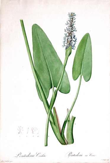 Pontederia cordata botanical